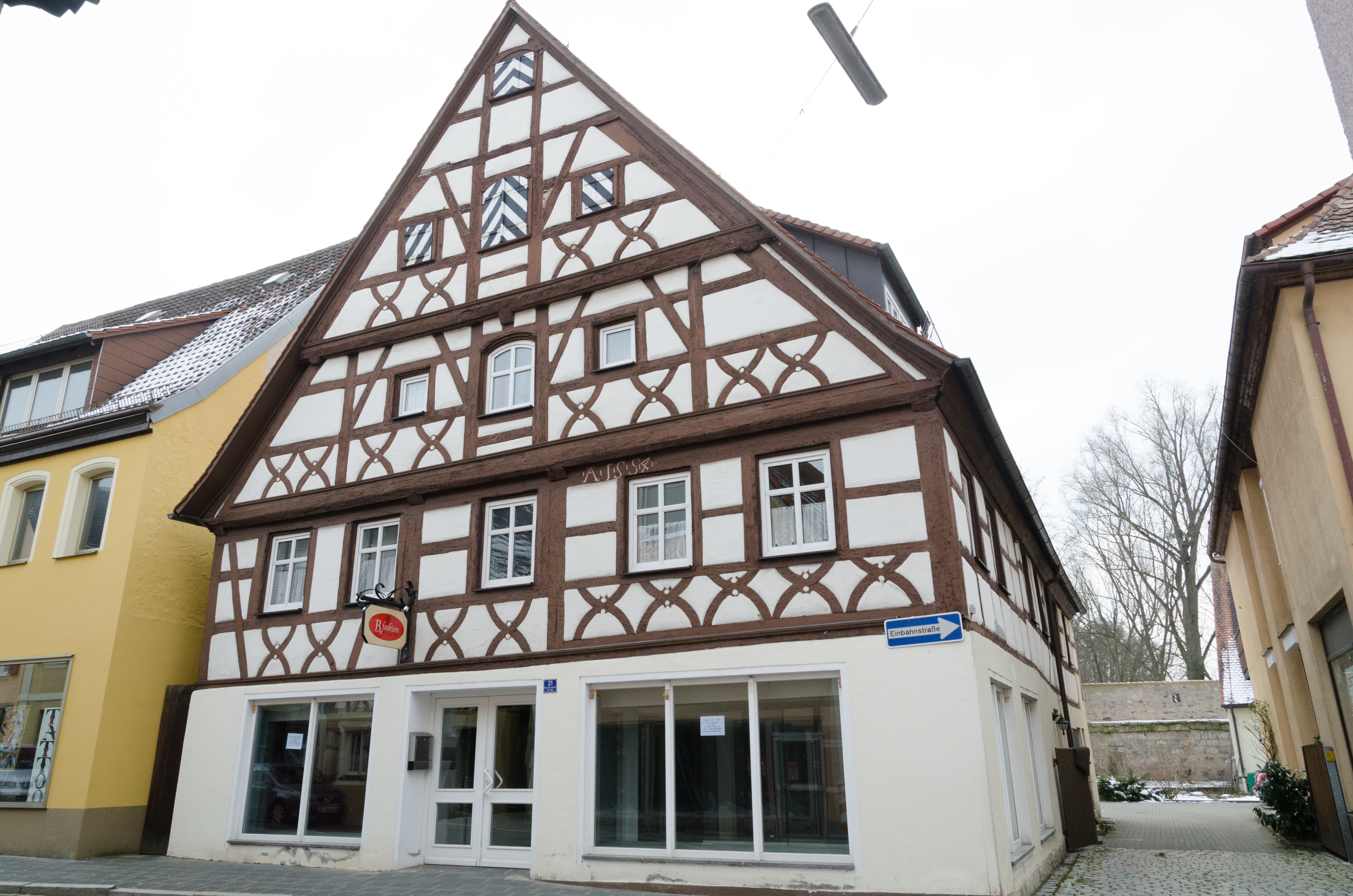 Neustadt an der Aisch, Würzburger Straße 21